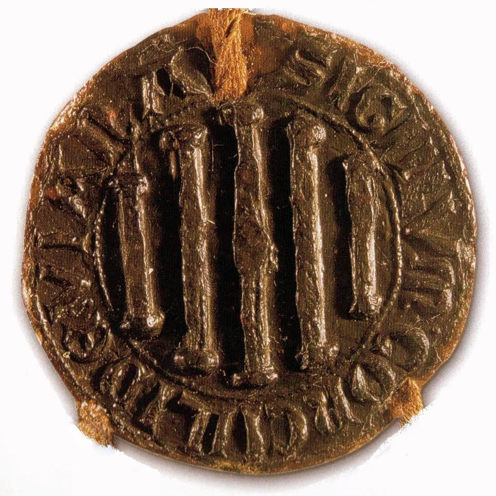 Sello en cera del Concejo de viana (Navarra) de 1276